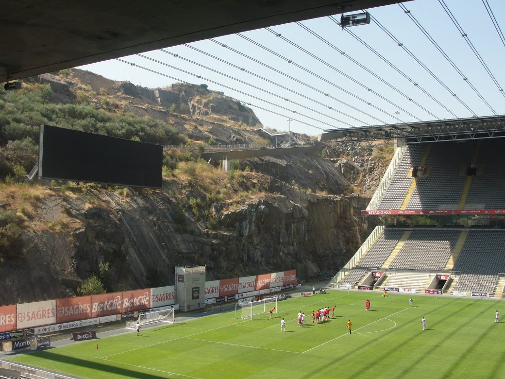 Eduardo Souto de Moura - Braga Stadium 23.jpg